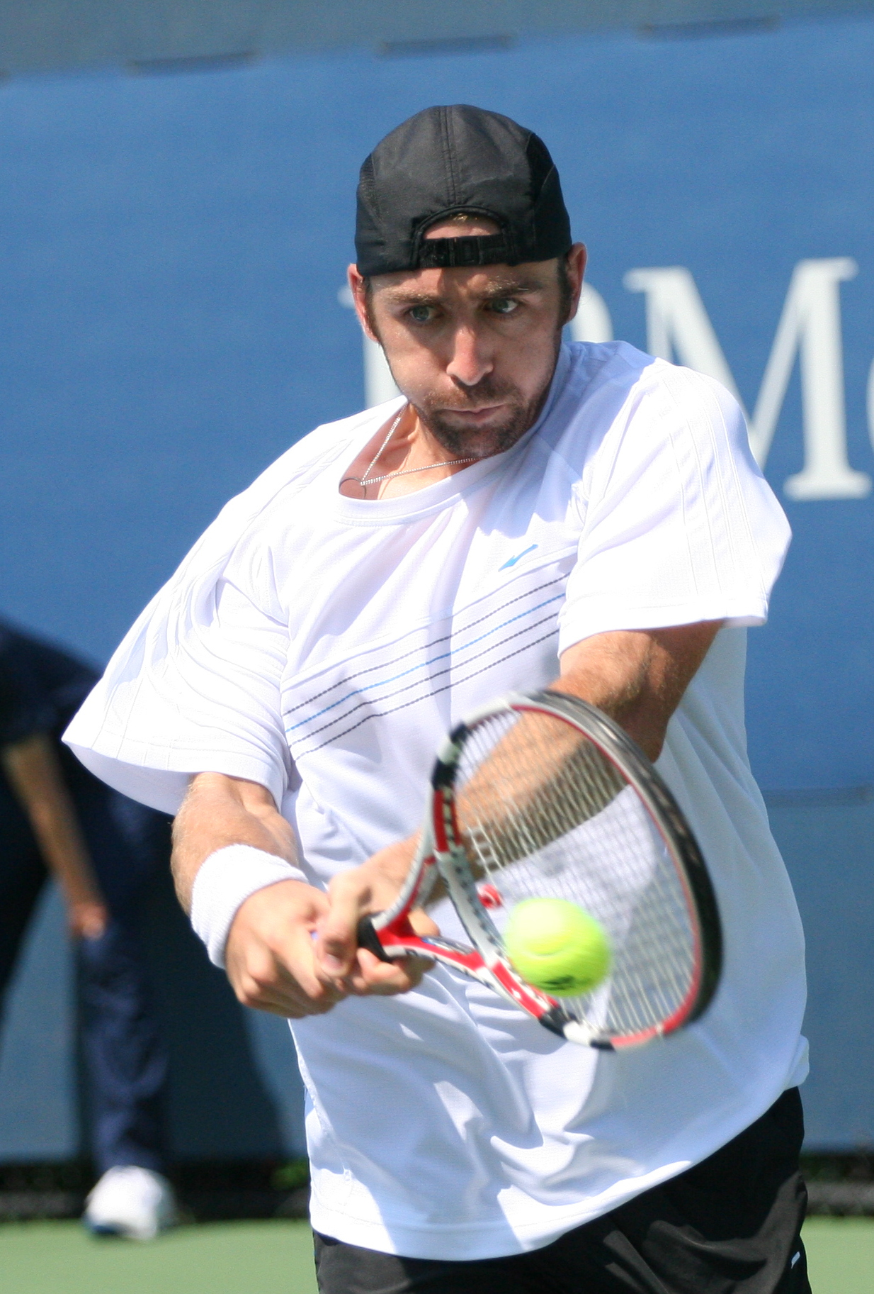 U.S. Open Sept. 2, 2010